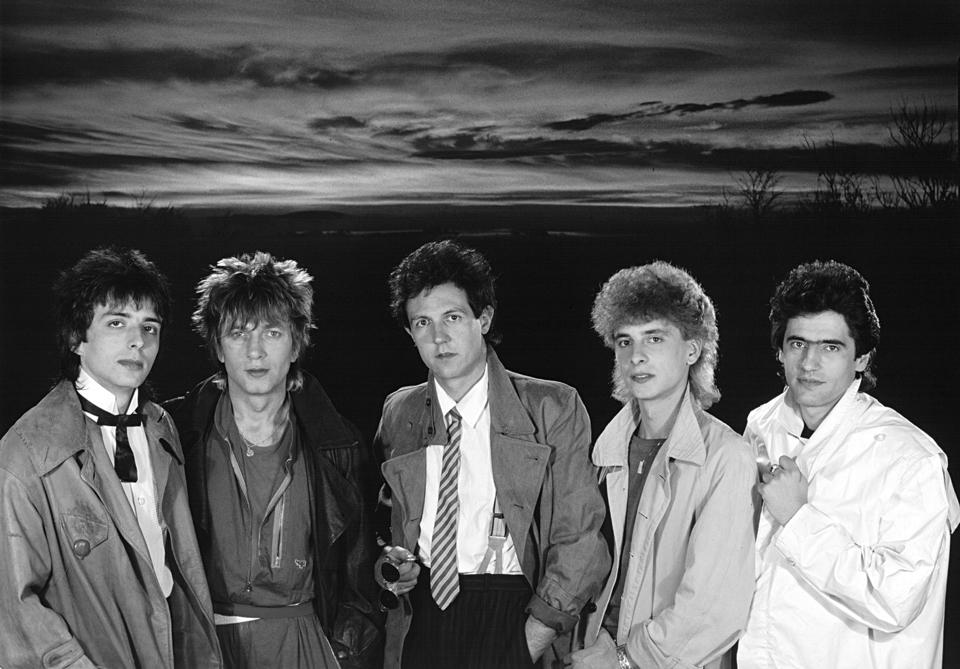 Валери Миловански, Дани Ганчев, Константин Марков, Стенли, Емил Герасимов